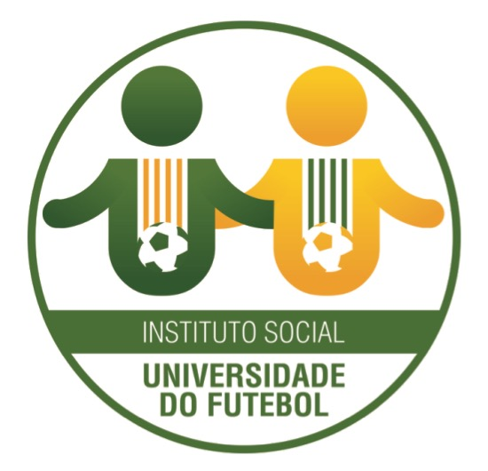 Logo do projeto social da Universidade do Futebol